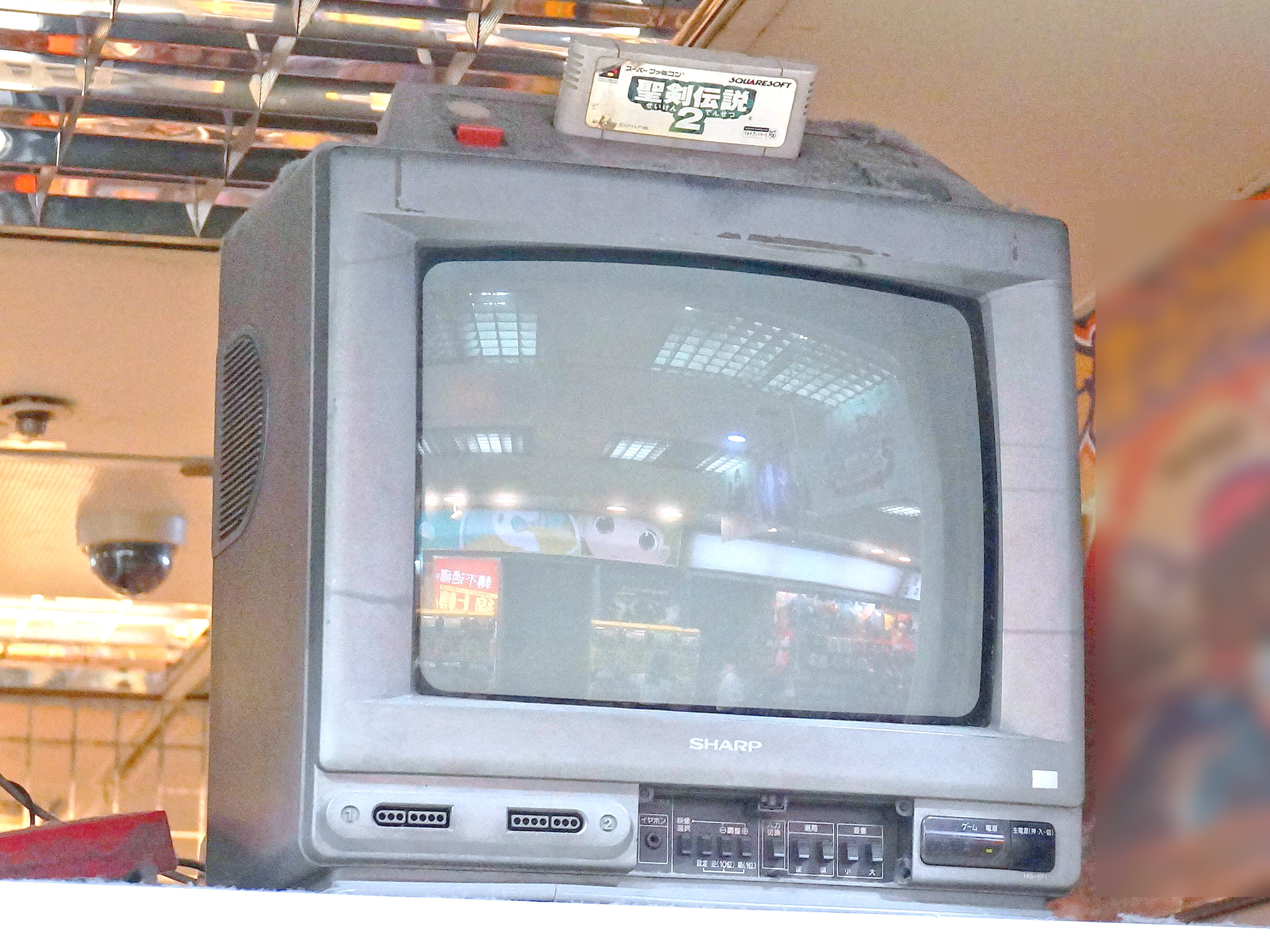 台北地下街67號店時光屋展示的夏普彩色電視機14G-SF1，頂端插史克威爾《聖劍傳說2》卡匣。